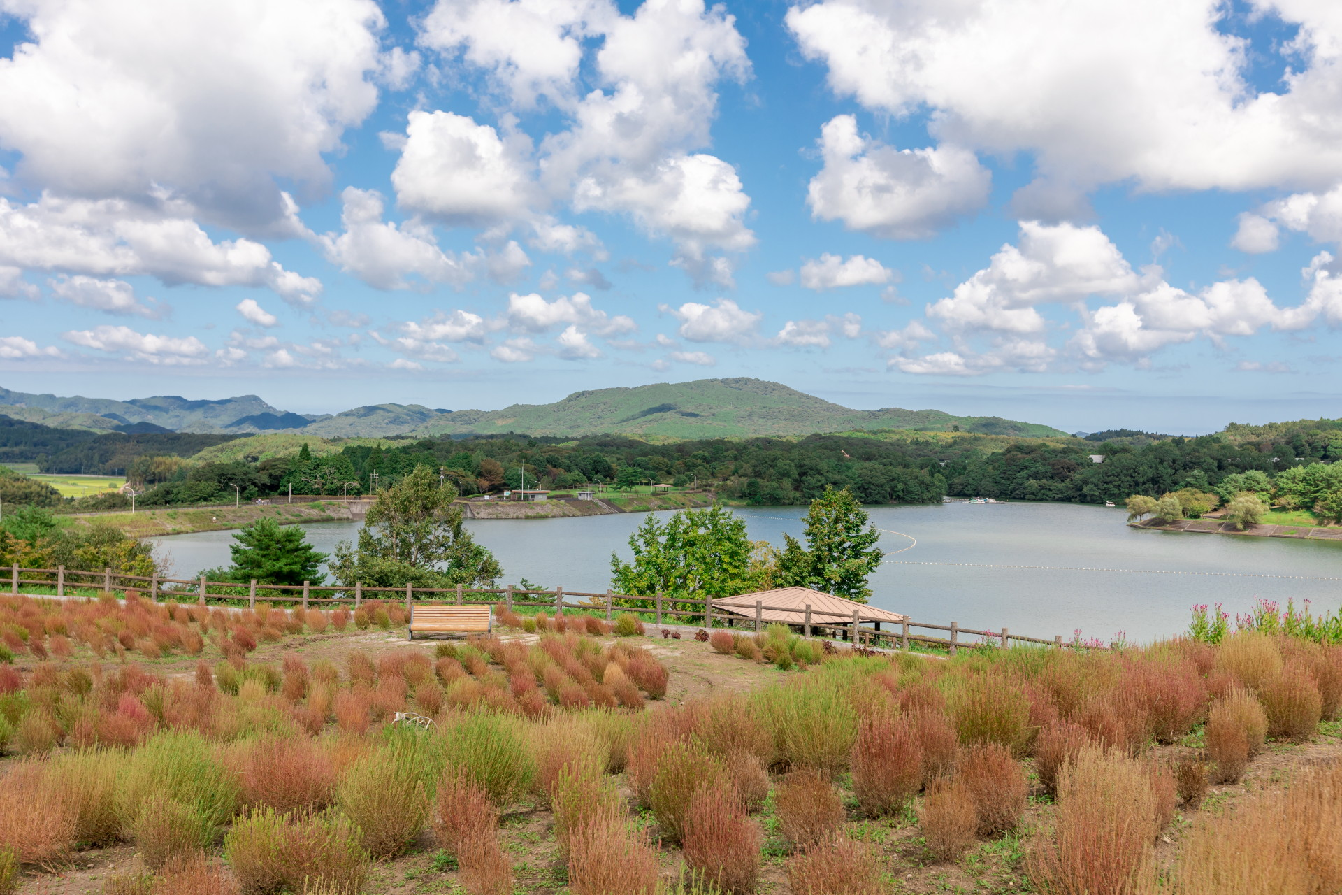 フラワーガーデンから見た湖 手前には秋らしいコキア（別名・ホウキグサ）